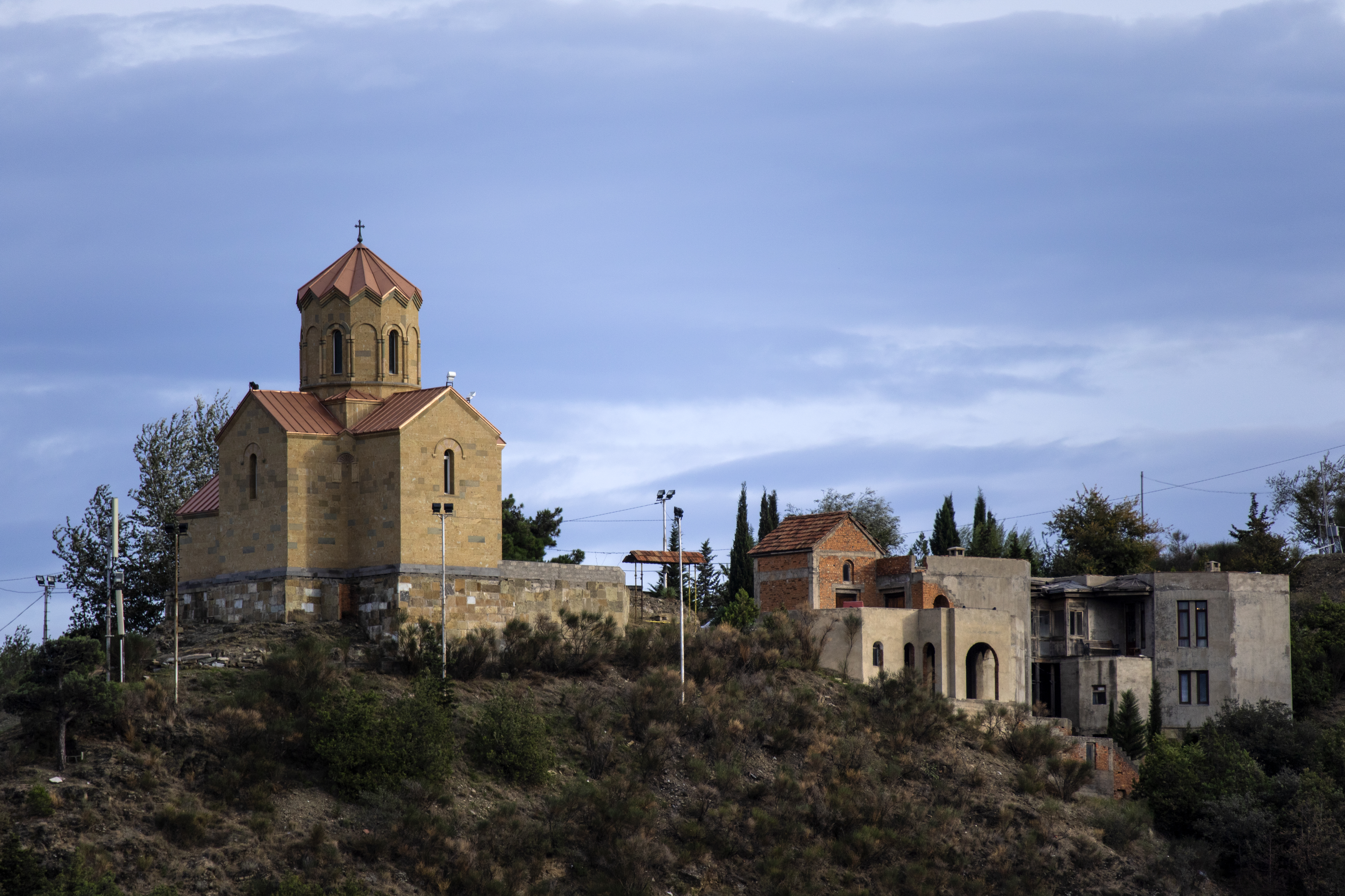 თაბორის ციხე, ყორჩი-ყალა — ფეოდალური ხანის ციხესიმაგრე და თანამედროვე ეკლესია თბილისში, ქალაქის ძველ უბანში, თაბორის ქედის ბოლოს, ბოტანიკური ბაღის თავზე. შემორჩენილია ციხის საძირკვლის ნანგრევები.